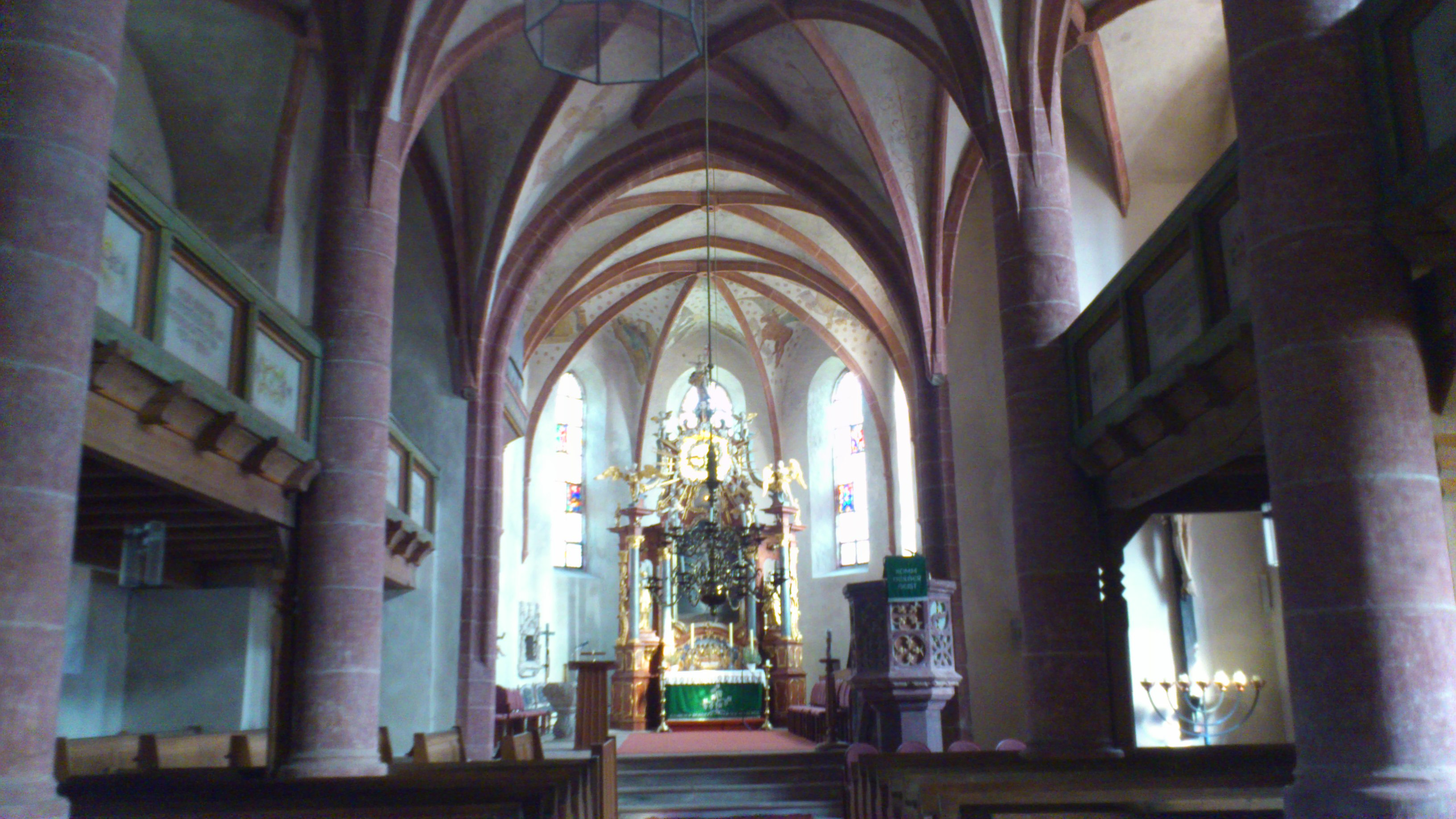 Wehrkirche Innenbereich